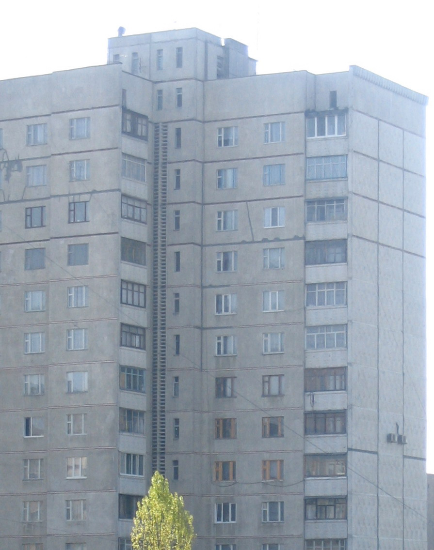 Харків, район "Нові Будинки". Шістнадцятиповерхова житлова будівля по вулиці Слинько.